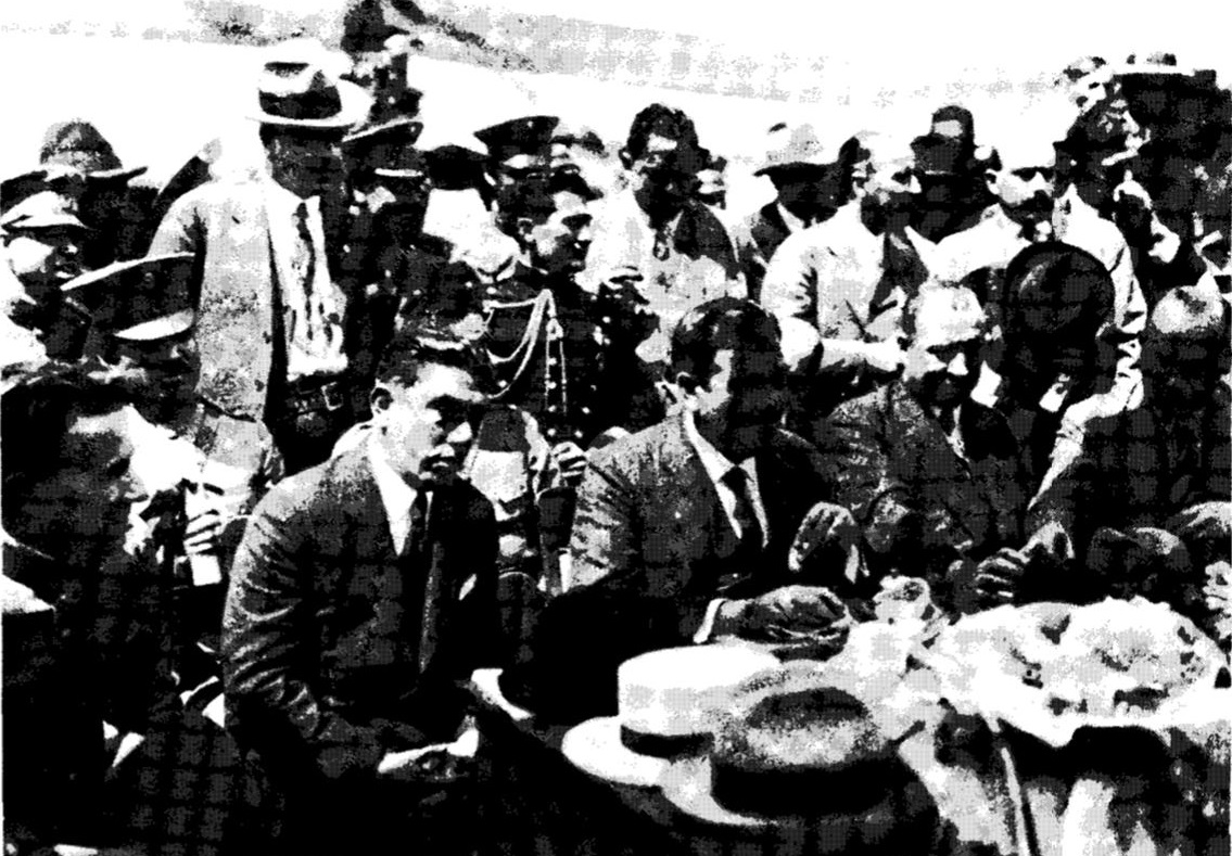 na de las acciones más celebradas del proyecto educativo callista, fue la fundación de escuelas centrales agrícolas. En el acto que aquí se muestra, se inaugura la escuela de la ciudad de Durango, el 19 de diciembre de 1926. A la derecha del presidente Calles, el secretario de Agricultura Luis León y, a su izquierda, el gobernador Enrique R. Nájera.